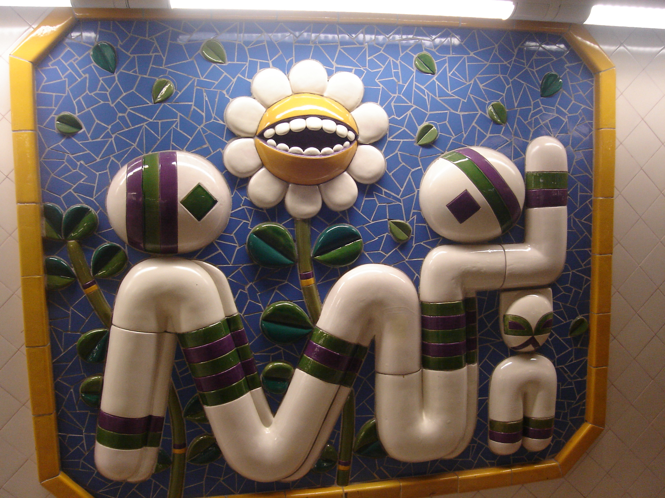 Konstverk på tunnelbanestationen S:t Eriksplan, Stockholm.